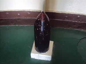 三笠の１５．５センチ副砲弾